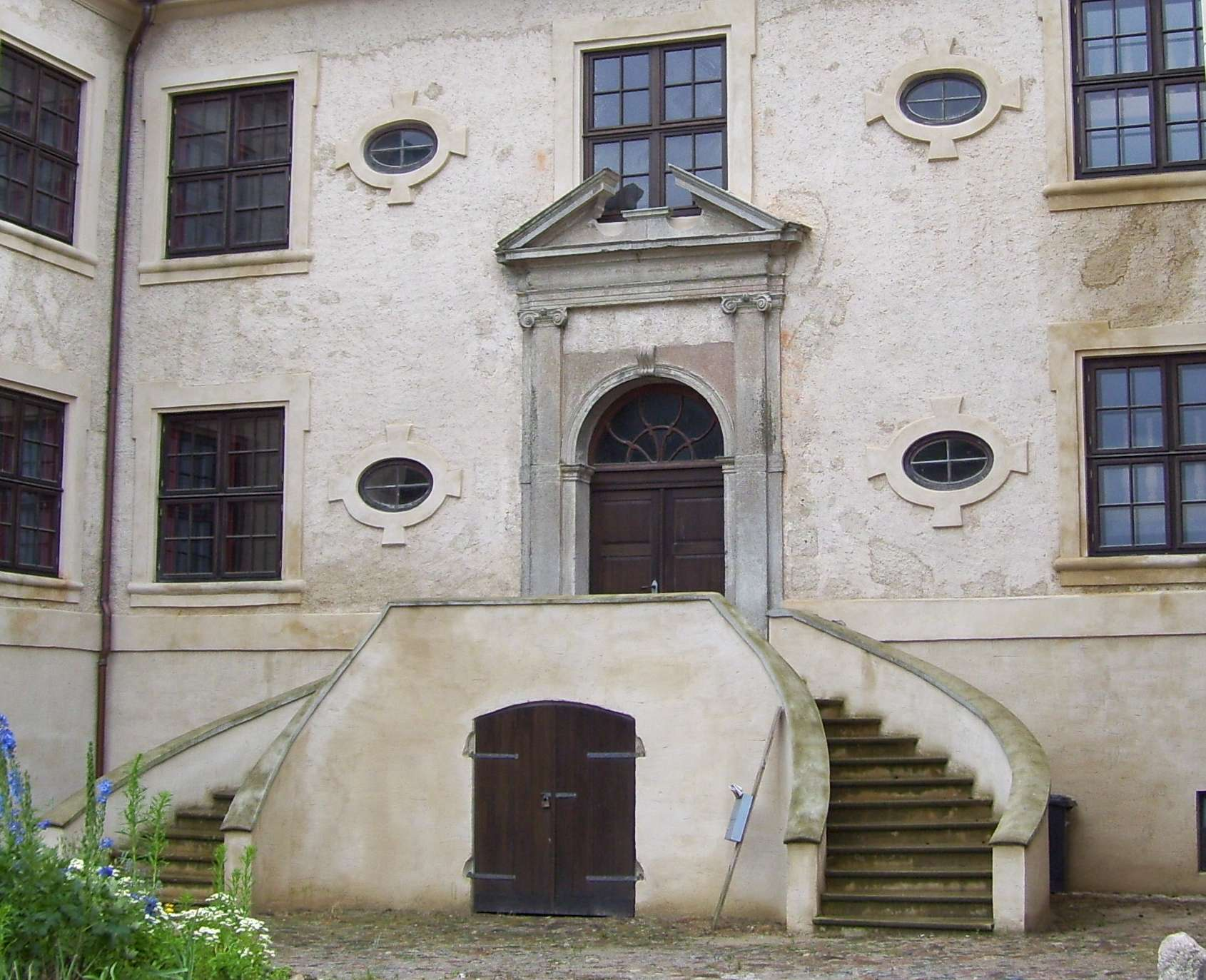 Schmarsow Landkreis Demmin - Schloss Schmarsow - Portal an der Norseite